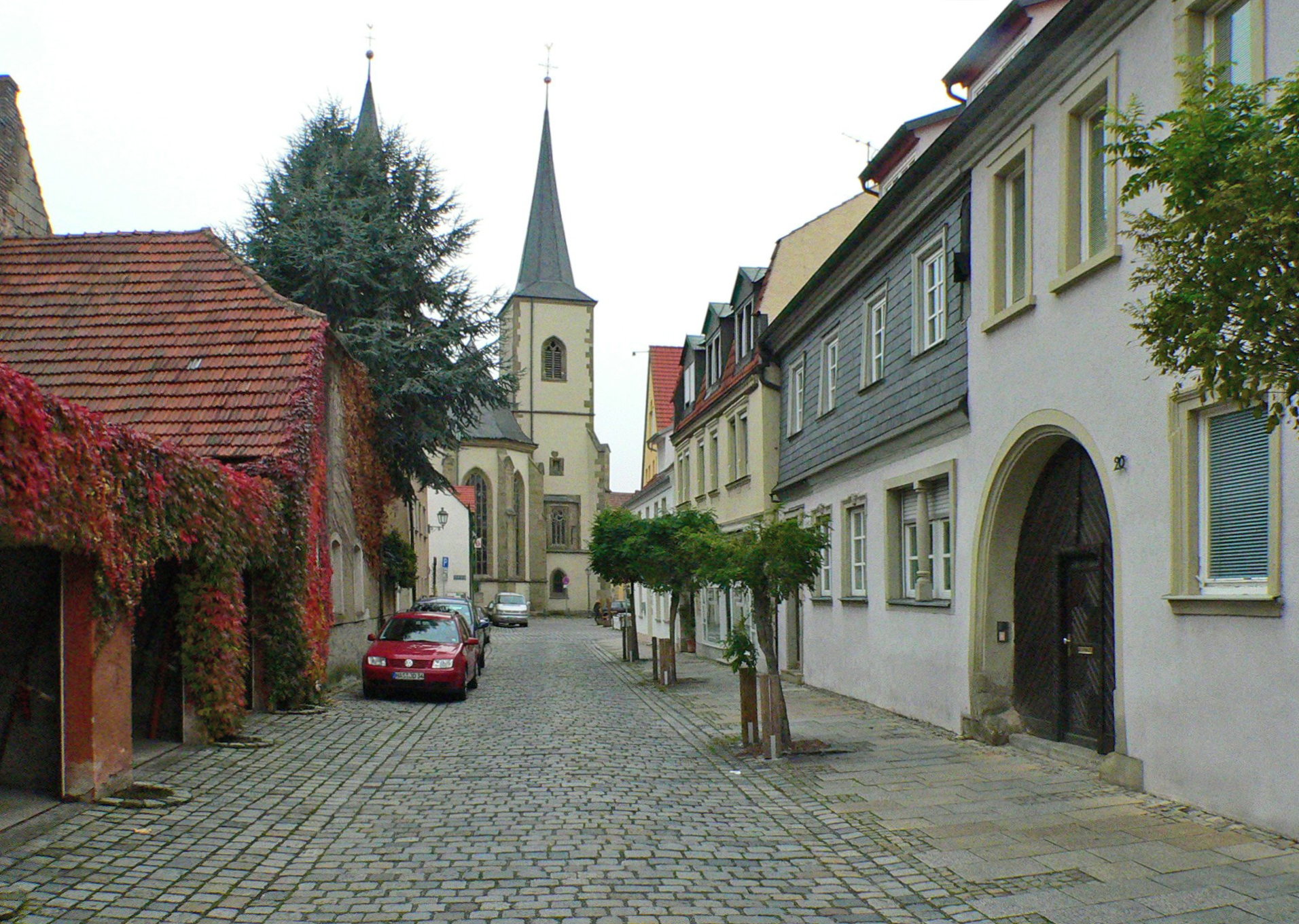 Haßfurt am Main - Stadtkirche